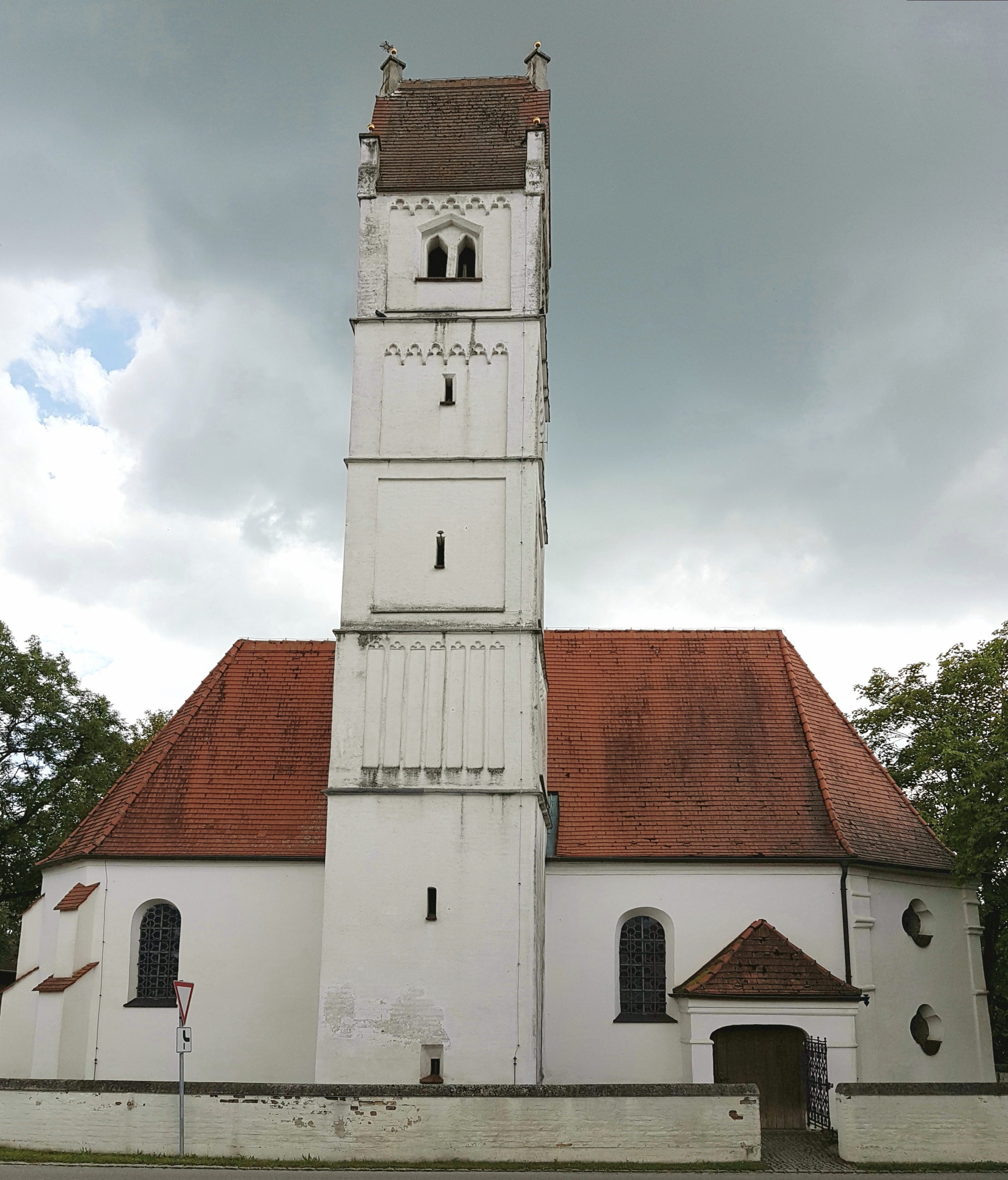 Thaining, Kirche St. Wolfgang, Ansicht von Norden.